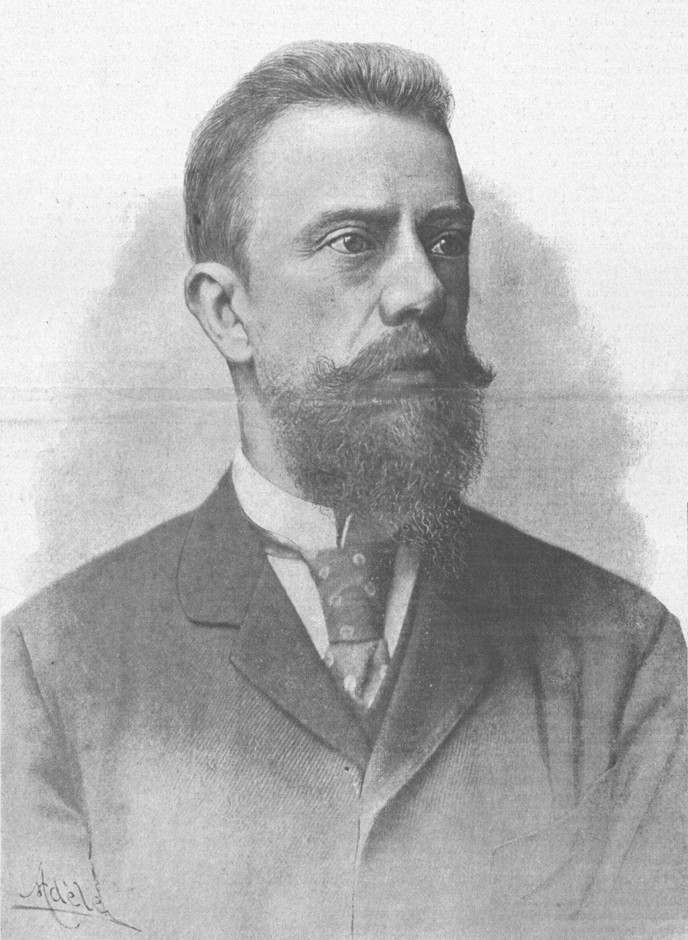 Friedrich Graf Schönborn (1841–1907), Austrian jurist and politician Se. Excellenz Dr. Friedrich Graf Schönborn, k. k. Justizminister. Der Reformator der österreichischen Strafgesetzgebung